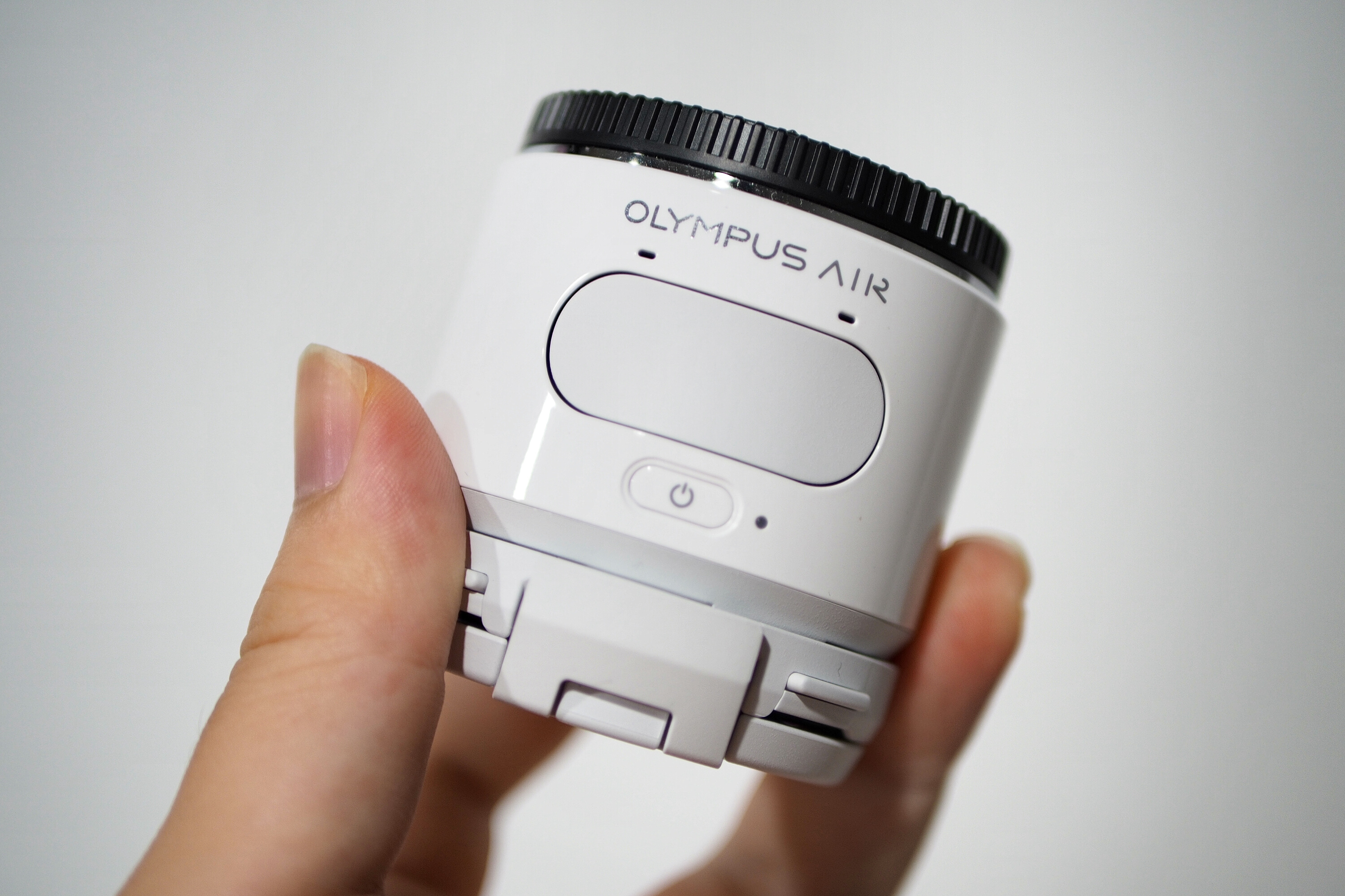 奥林巴斯 Air A01，手持